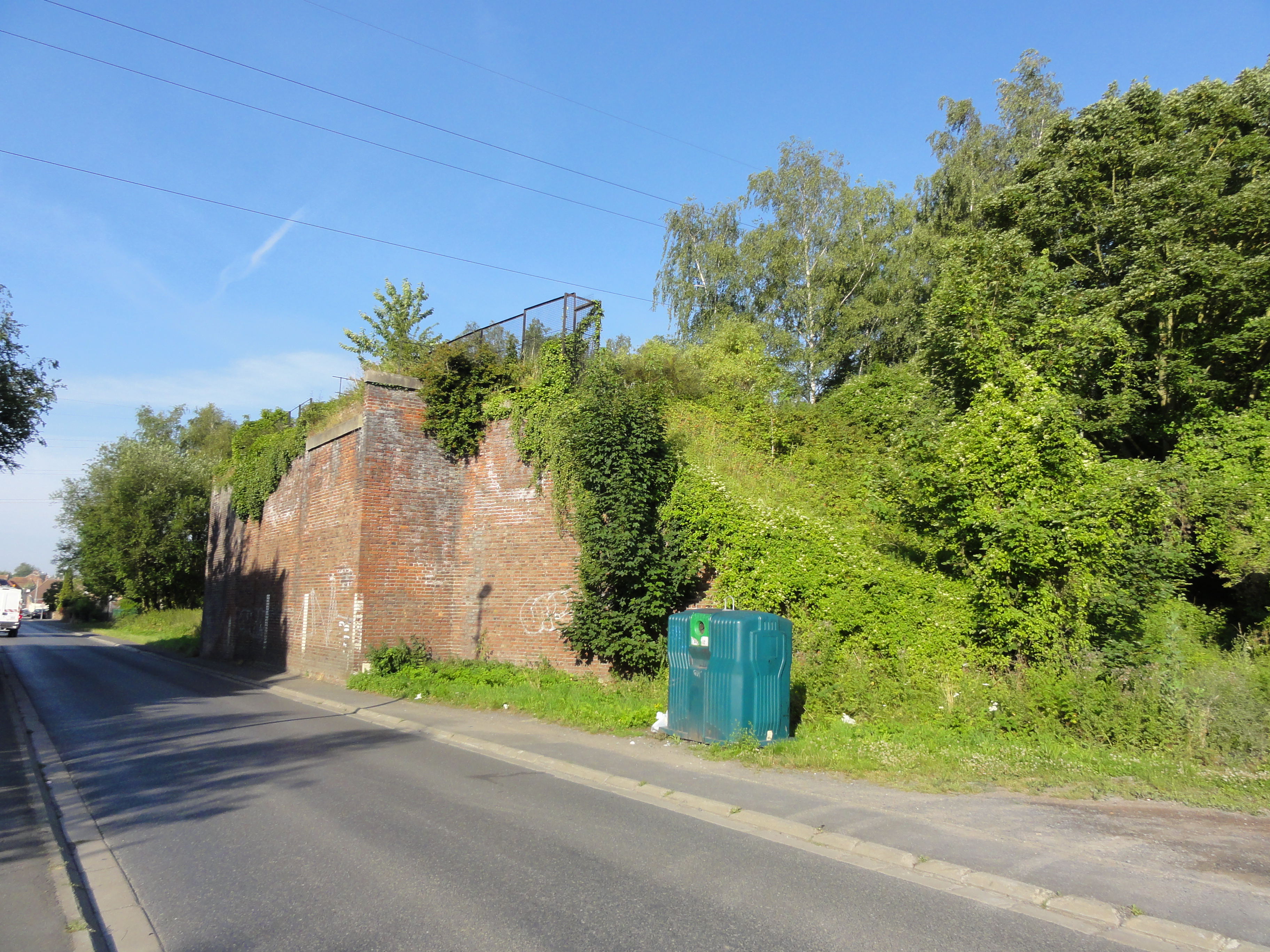 Terril n° 252 dit Cavalier du siège Notre Dame, Fosse Notre Dame de la Compagnie des mines d'Aniche, Sin-le-Noble, Nord, Nord-Pas-de-Calais, France.